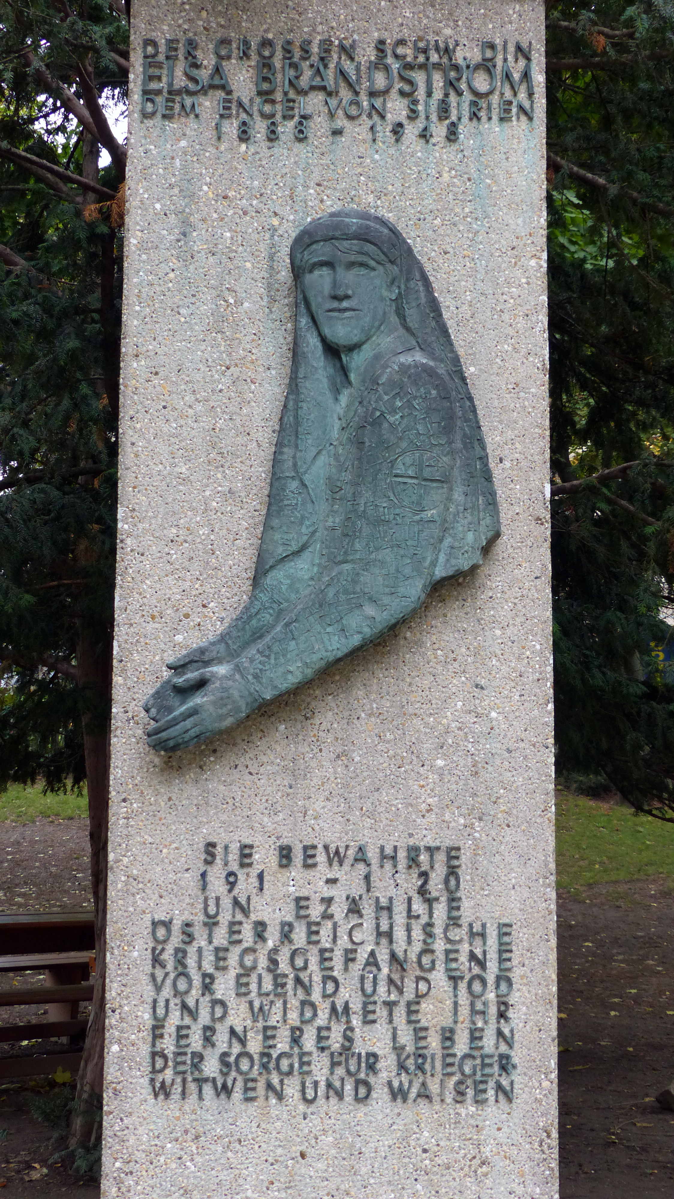 Elsa Brändström-Denkmal im Arne-Carlsson-Park in Wien